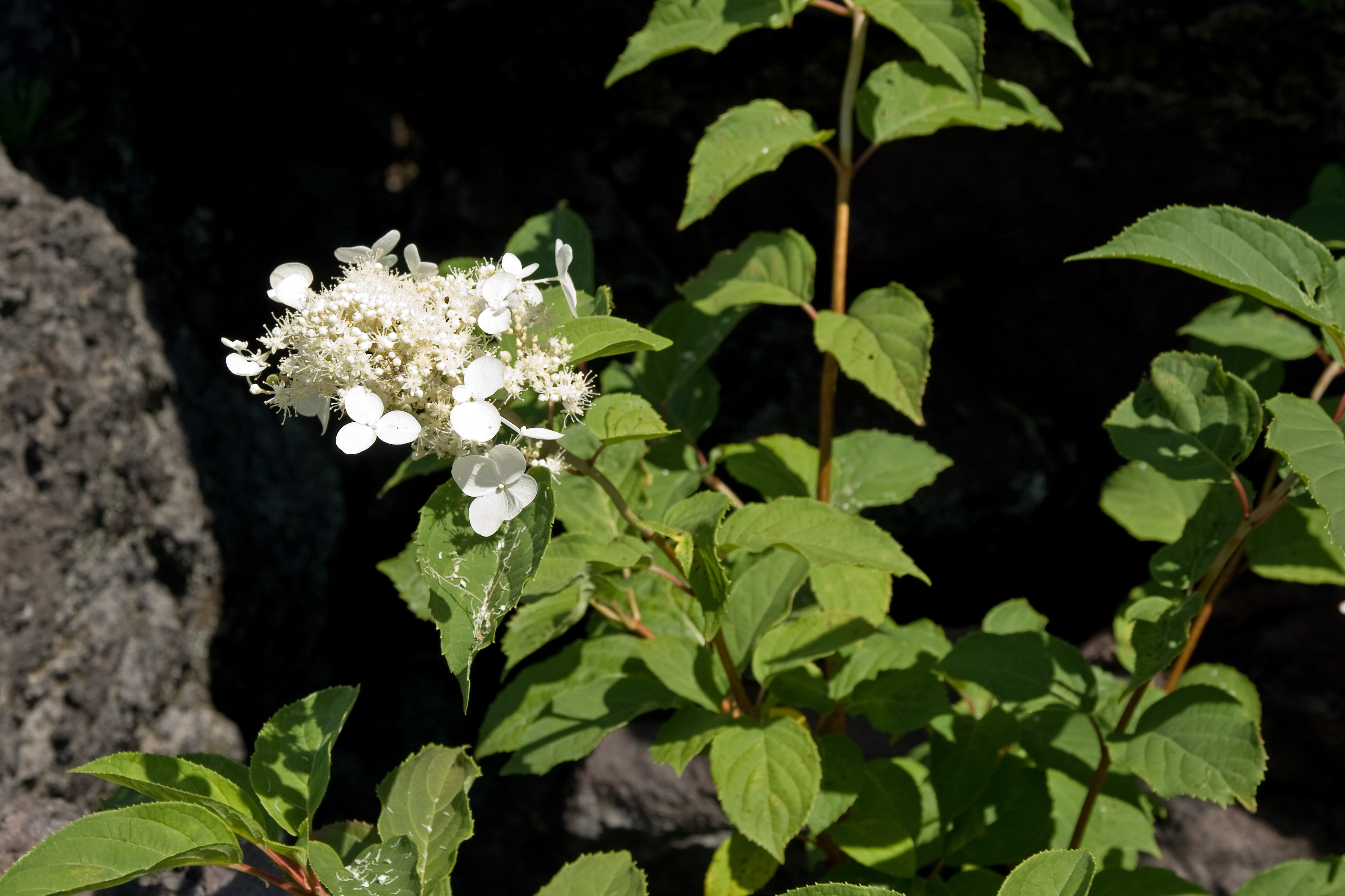 ノリウツギ (学名：Hydrangea paniculata）